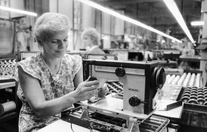 ADN-ZB/14.8.86 Bez. Schwerin: Wettbewerb Einen Teil der Endkontrolle bei der Montage einer Flachbetthaushaltsnähmaschine führt Mechanikerein Ilse Hauf nunmehr an einem neu gestalteten Arbeitsplatz aus. Er gehört zu einer umfangreichen Rationalisierungslösung im Wittenberger Nähmaschinenwerk, dessen Montagebänder täglich über 1000 Haushaltsnähmaschinen verlassen. Eine höhere Effektivität und bessere Arbeitsbedingungen wurden u.a. durch das Integrieren der Motorenmontage und einiger Qualitätskontrollen unmittelbar in den Bandprozeß erreicht. Diese und ähnliche Lösungen erleichtern die Arbeit an 40 Arbeitsplätzen.